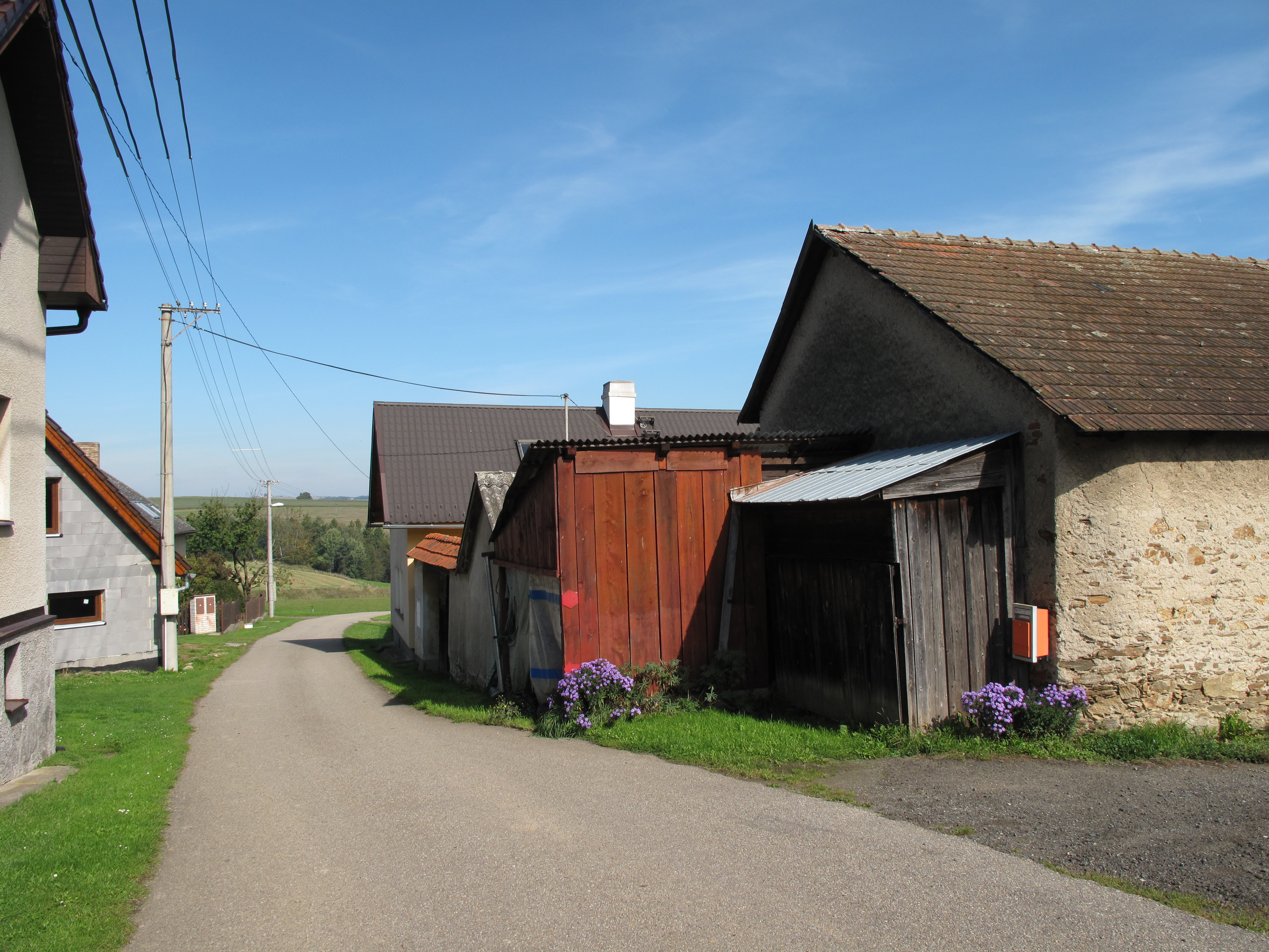 Silnice v Kácovské Lhotě. Okres Benešov, Česká republika.